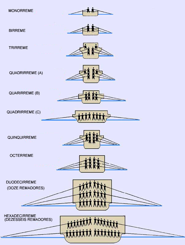 A etimologia de embarcações a remo da Antiguidade está vinculada ao número de remadores em cada bordo da embarcação